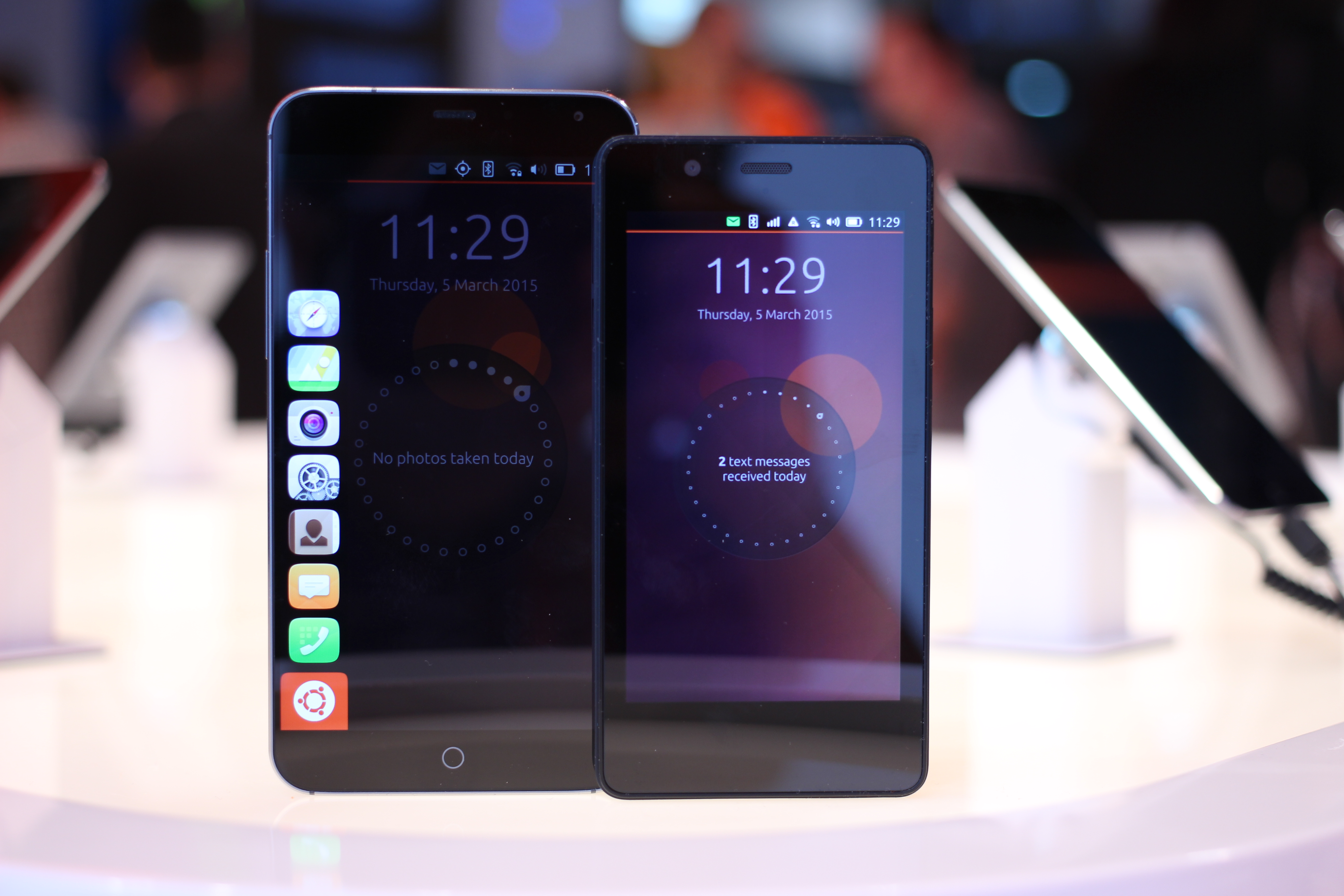 Ubuntu Phone